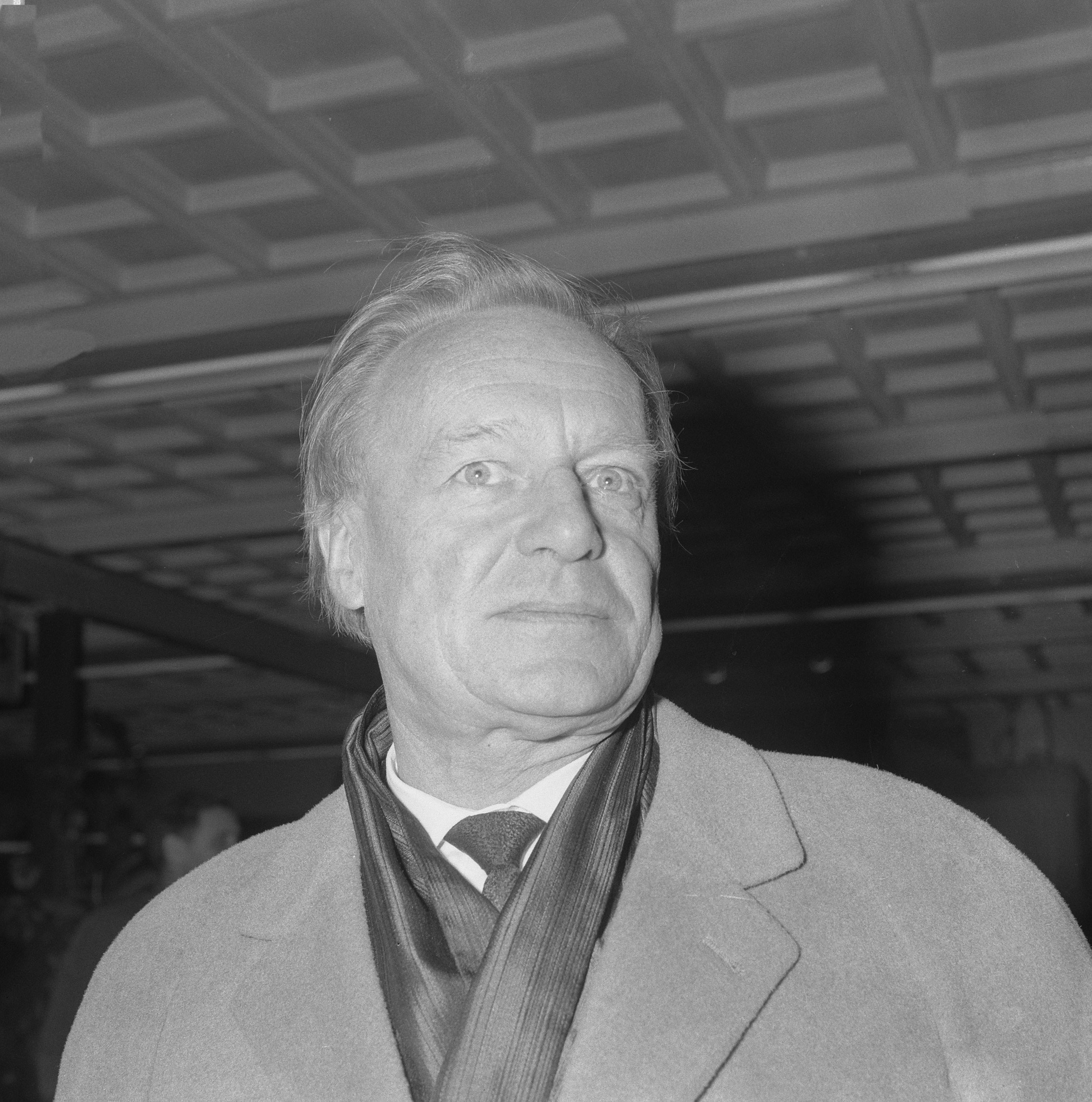 Collectie / Archief : Fotocollectie Anefo Reportage / Serie : Franse dirigent en pianist André Cluytens Beschrijving : dirigenten, musici, portretten, Cluytens, André Datum : 31 oktober 1965 Trefwoorden : dirigenten, musici, portretten Persoonsnaam : Cluytens, André Fotograaf : Kroon, Ron / Anefo Auteursrechthebbende : Nationaal Archief Materiaalsoort : Negatief (zwart/wit) Nummer archiefinventaris : bekijk toegang 2.24.01.03 Bestanddeelnummer : 918-3905